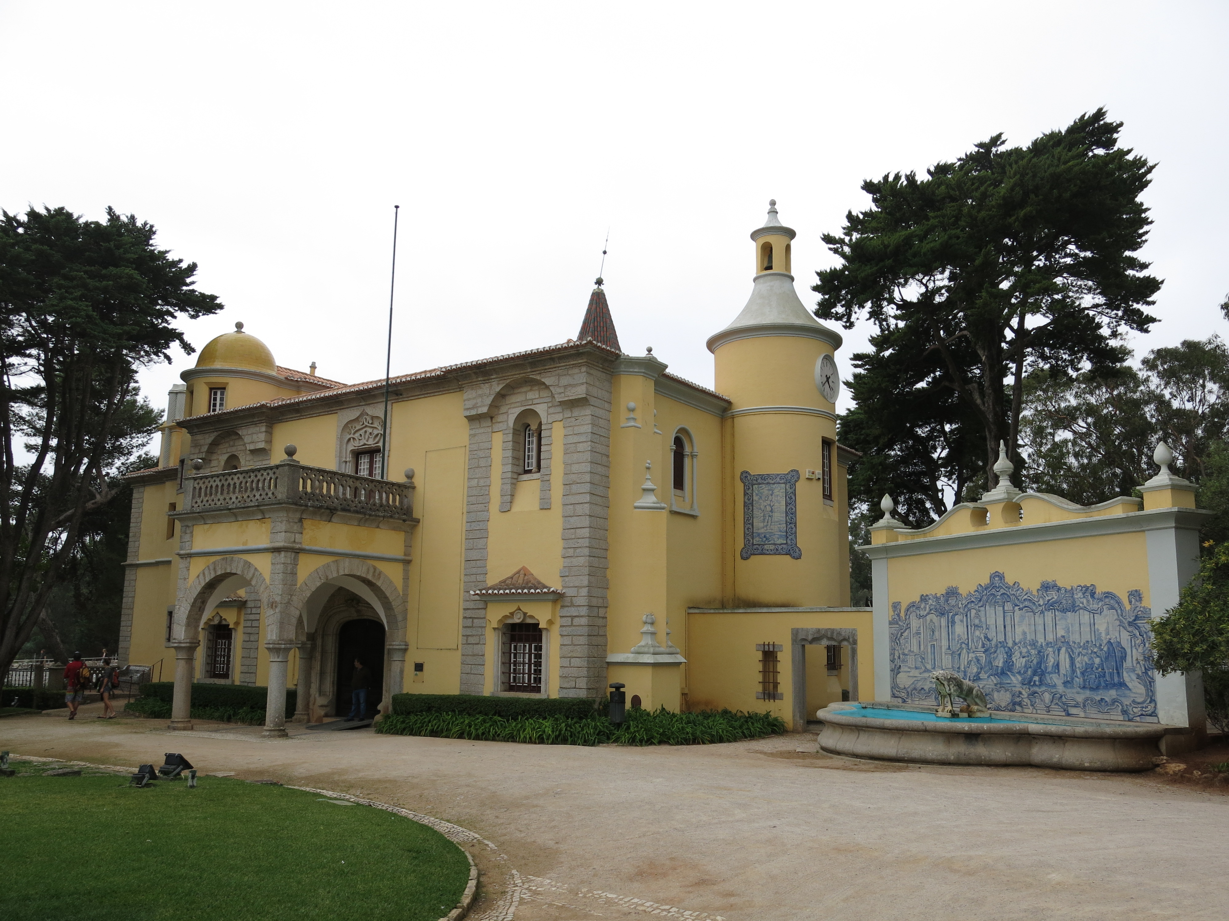 2016-10-21_Cascais_6190